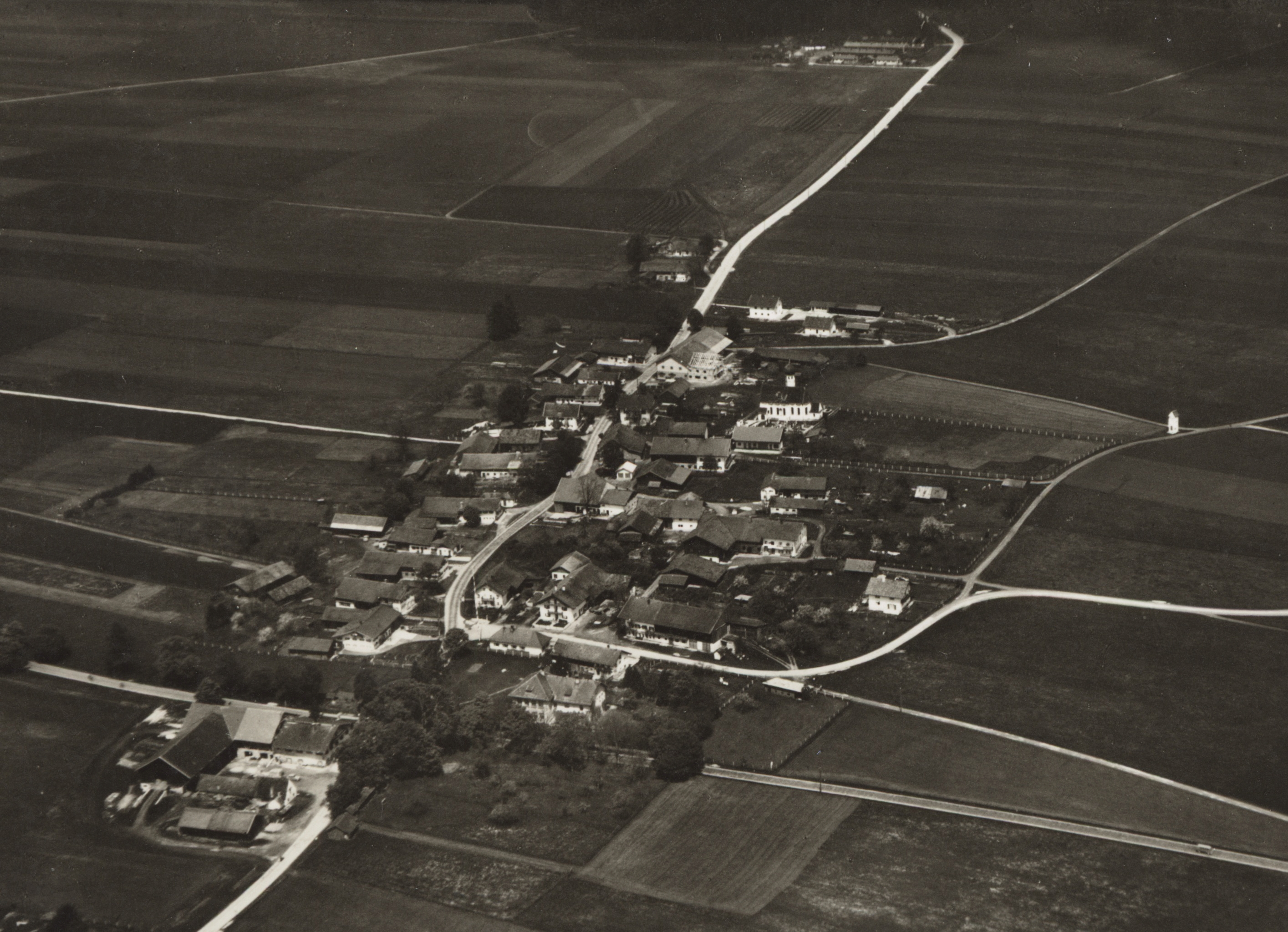 Faistenhaar (Gem. Brunnthal), Luftaufnahme aus dem Jahre 1959, von Südost nach Nordwest.